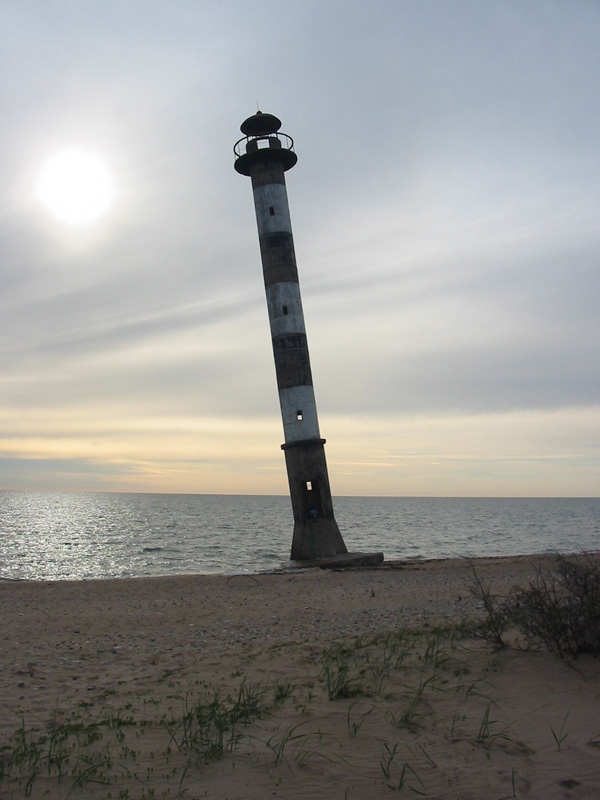 Kiipsaare tuletorn